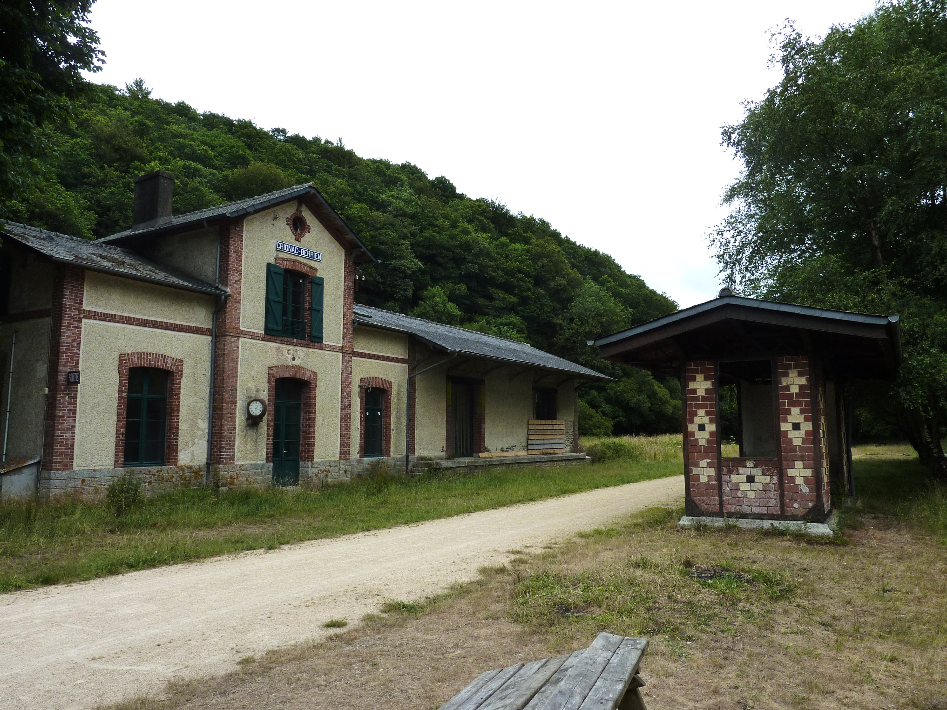 L'ancienne gare du "réseau breton" de Berrien-Scrignac et l'emprise de l'ancienne voie ferrée reconvertie en "voie verte"